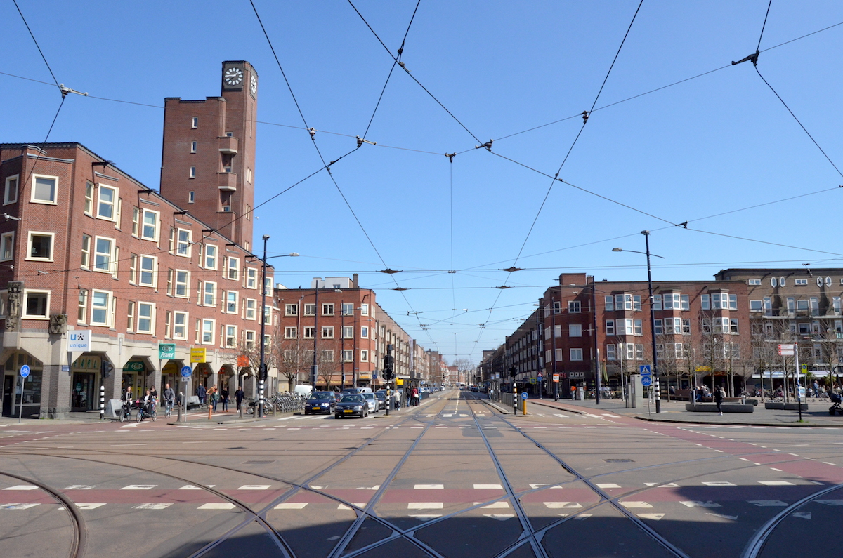 Grand Union op het Mercatorplein in Amsterdam-West. links 36-96, midden 34 en rechts 2-32. Foto: Erik Swierstra.